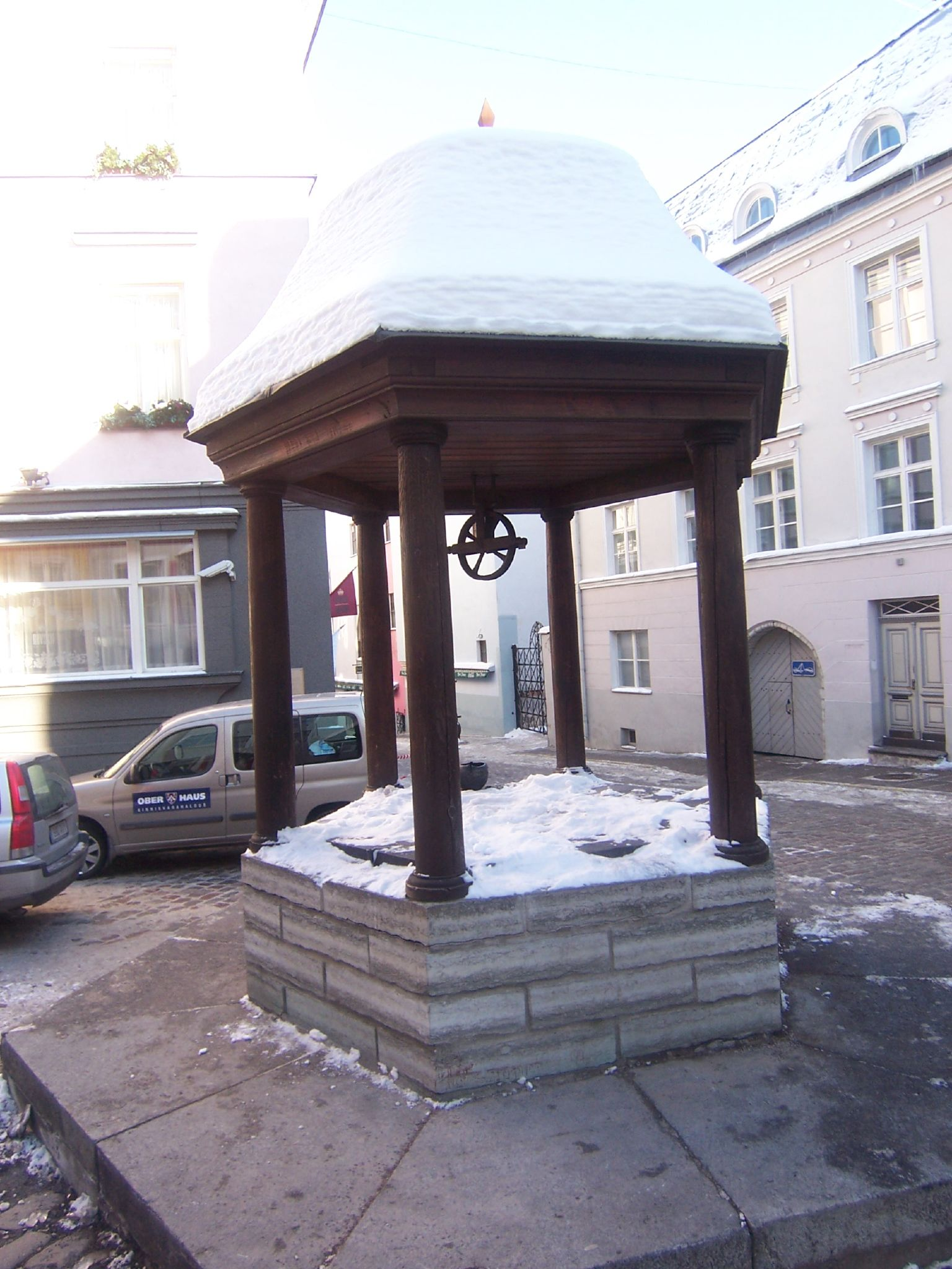 Rataskaev Tallinna vanalinnas